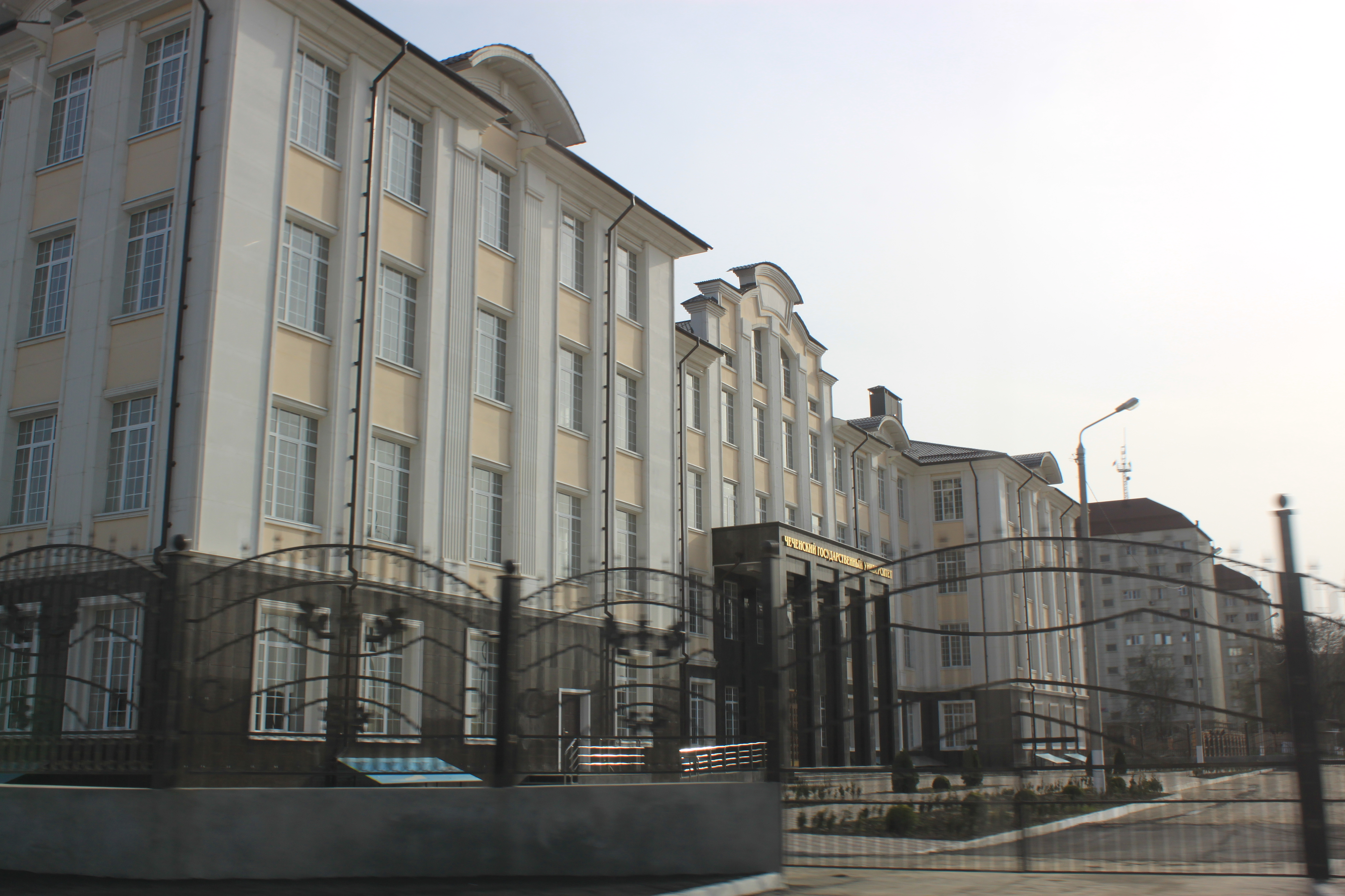 Чеченский государственный университет